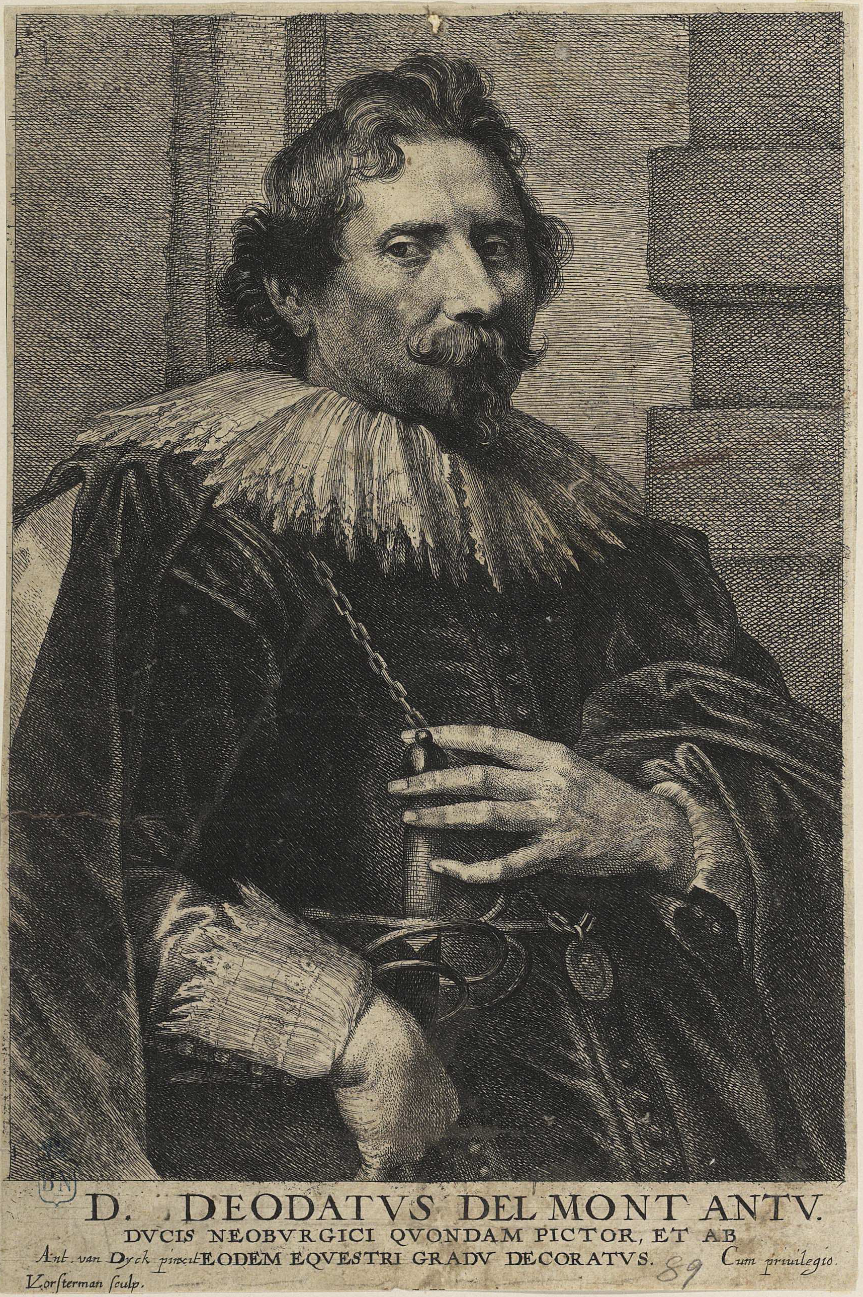 Retrato de Deodatus del Mont (Deodat van der Mont) por Lucas Vorsterman según dibujo de Anton van Dyck, aguafuerte y buril, Madrid, Biblioteca Nacional